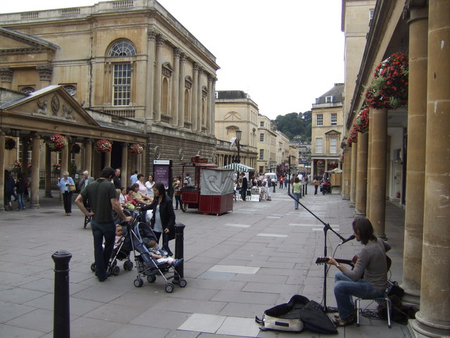 Busking in Stall Street